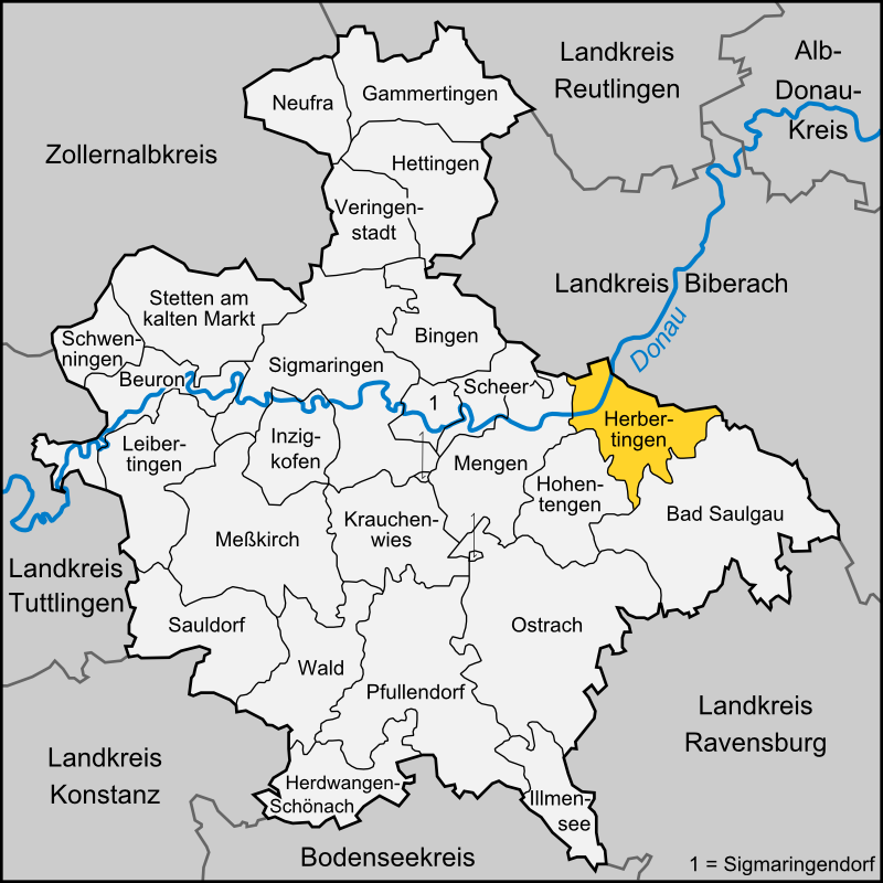 Karte der Gemeinde Herbertingen im Landkreis Sigmaringen